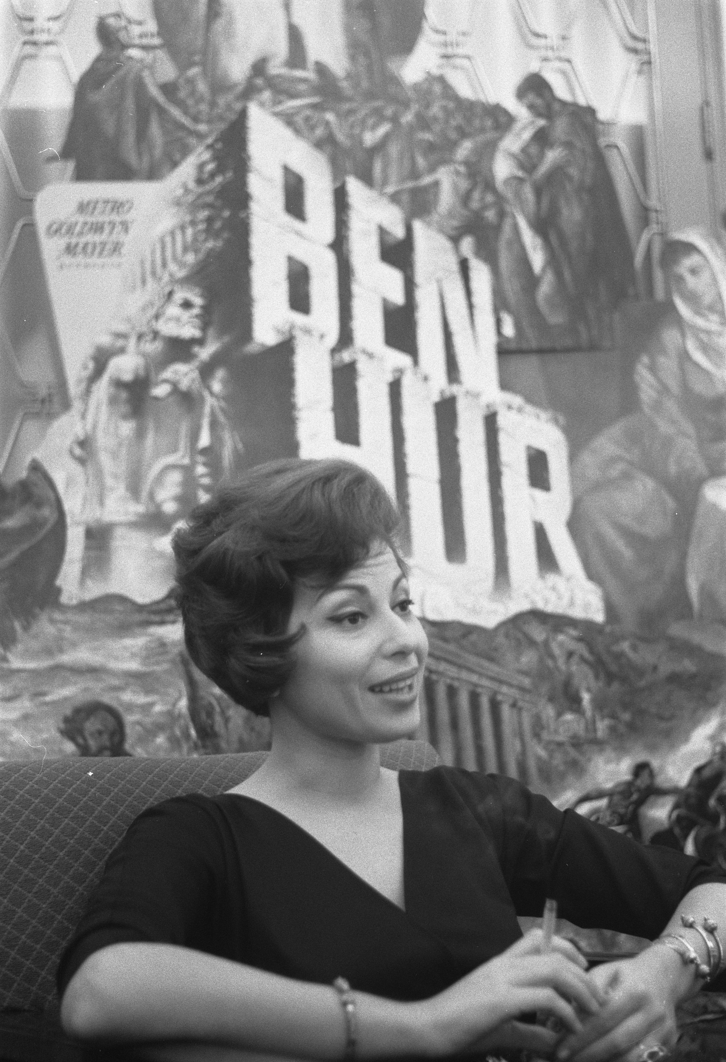 Collectie / Archief : Fotocollectie Anefo Reportage / Serie : [ onbekend ] Beschrijving : Persconferentie in het Carltonhotel door filmactrice Haya Harareet Annotatie : [Promotie film "Ben Hur"]. Harareet speelde de rol van Esther in deze film. Datum : 7 oktober 1960 Locatie : Amsterdam, Noord-Holland Trefwoorden : actrices, filmsterren, hotels, persconferenties Persoonsnaam : Harareet, Haya Fotograaf : Pot, Harry / Anefo Auteursrechthebbende : Nationaal Archief Materiaalsoort : Negatief (zwart/wit) Nummer archiefinventaris : bekijk toegang 2.24.01.05 Bestanddeelnummer : 911-6572